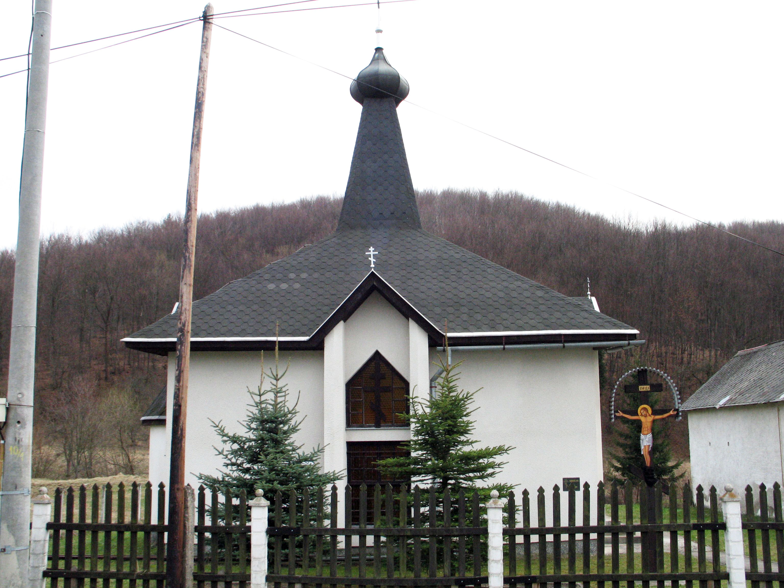 Pravoslávna cerkva v obci Dobroslava